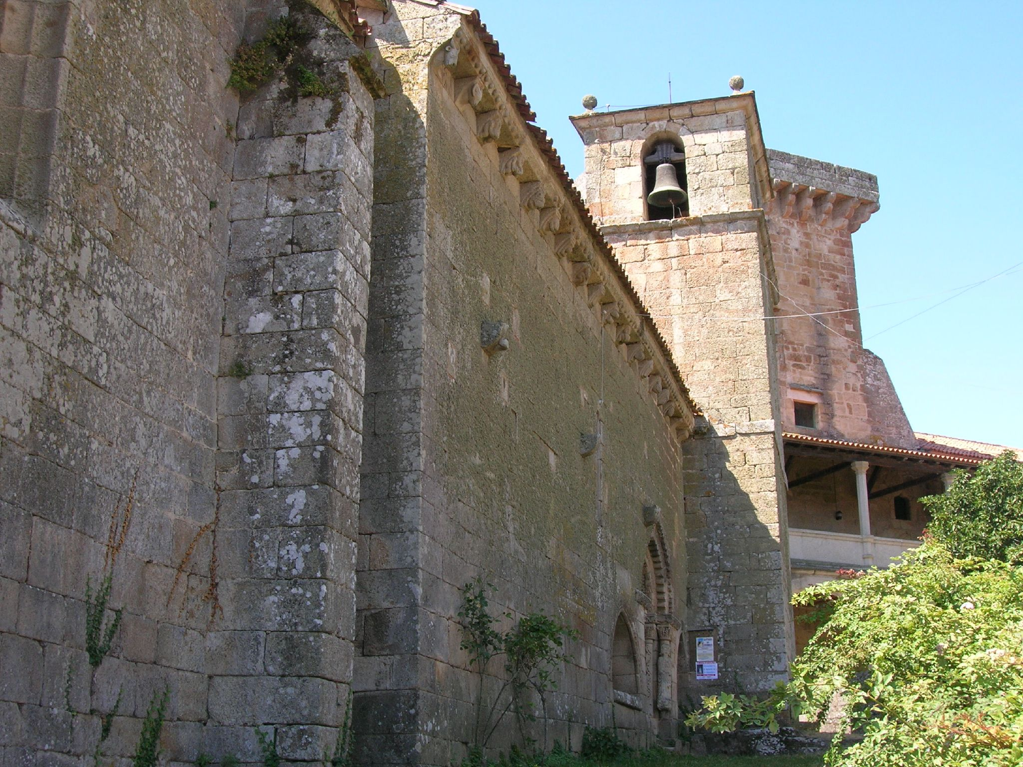 Acrópole de Monterrei